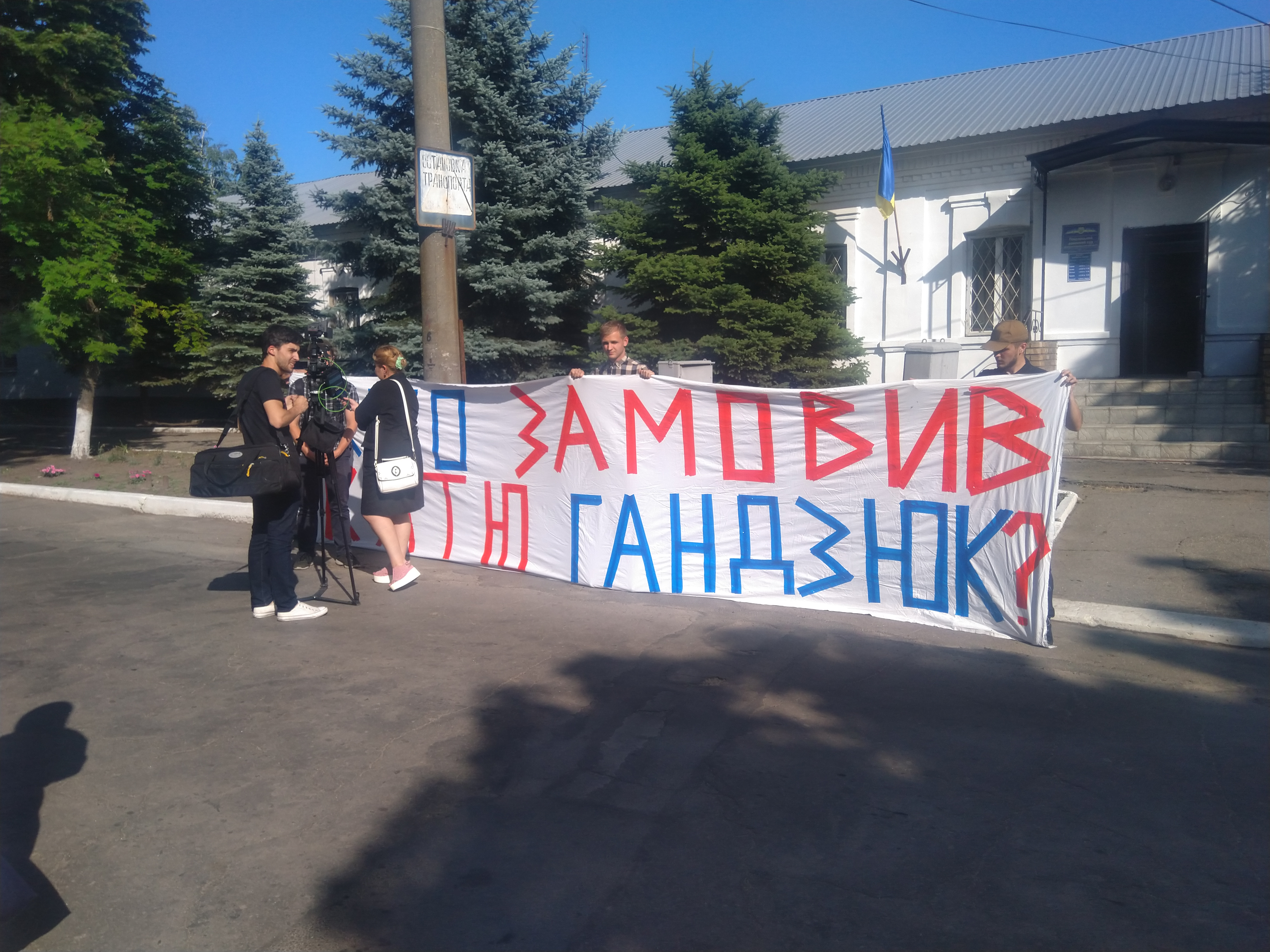 Біля Покровського районного суду в день винесення вироку, акція «Хто замовив Катю Гандзюк»